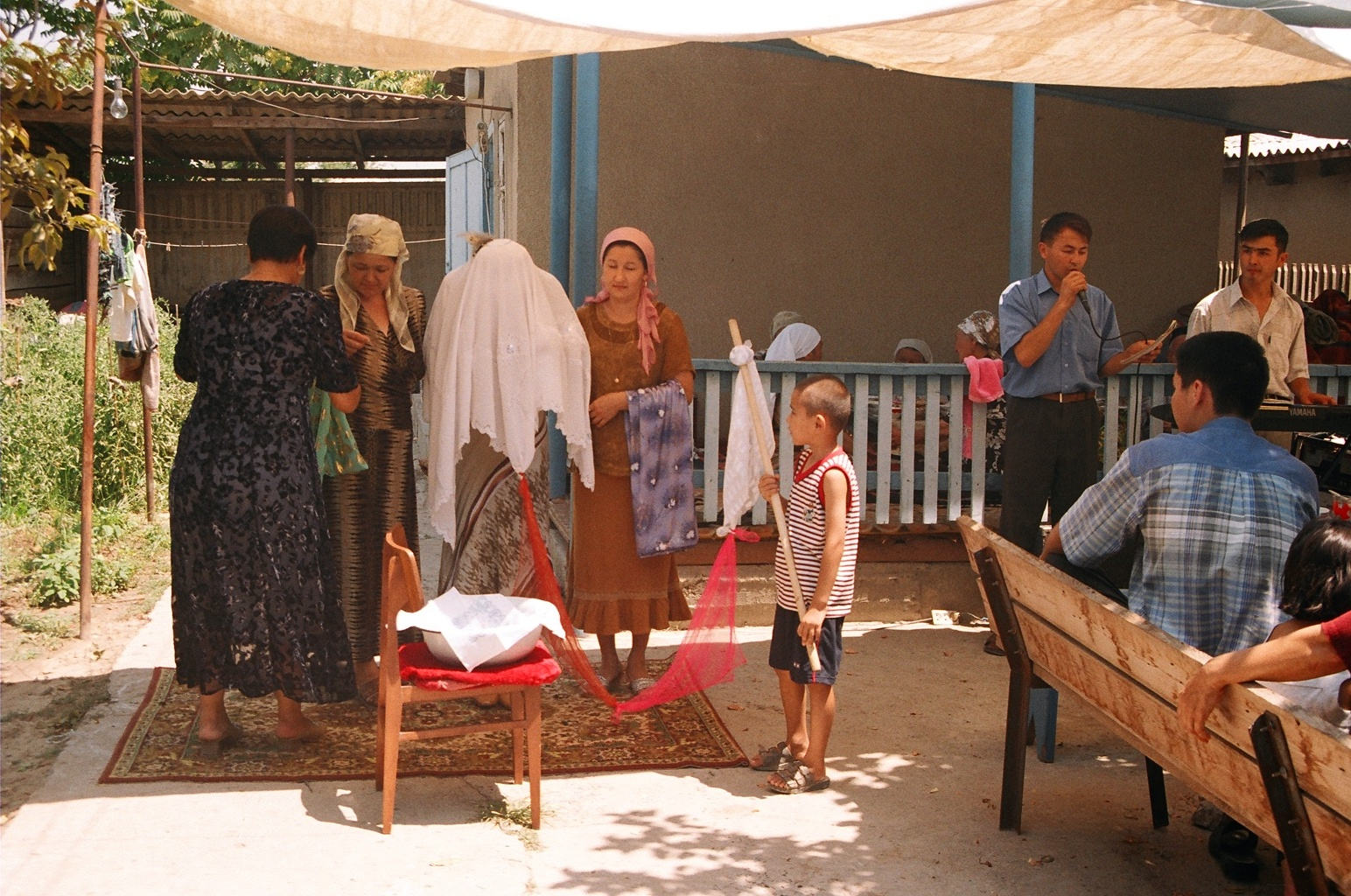 Свадебные обряды казахов.